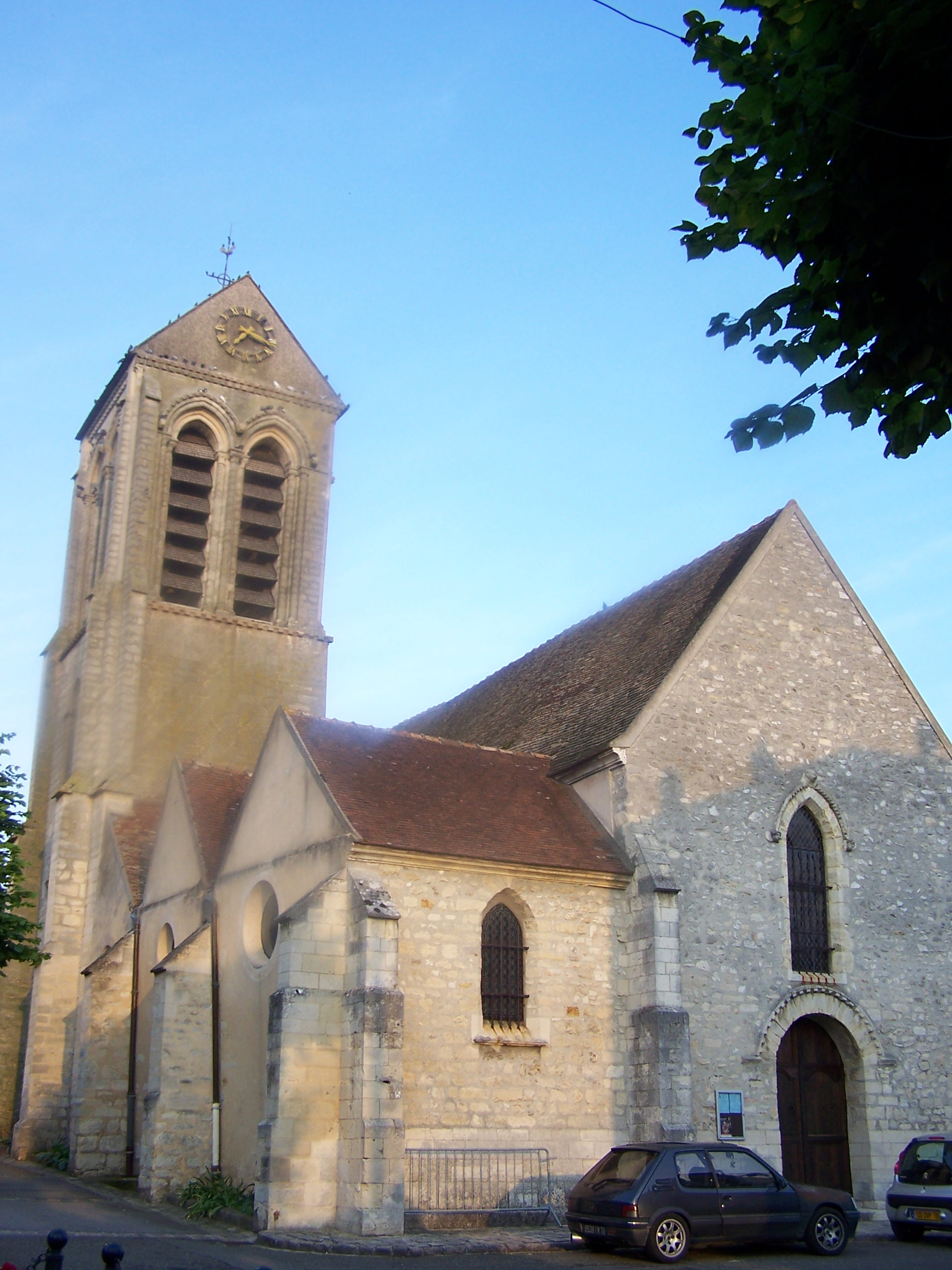 Église de Chavenay (Yvelines, France)